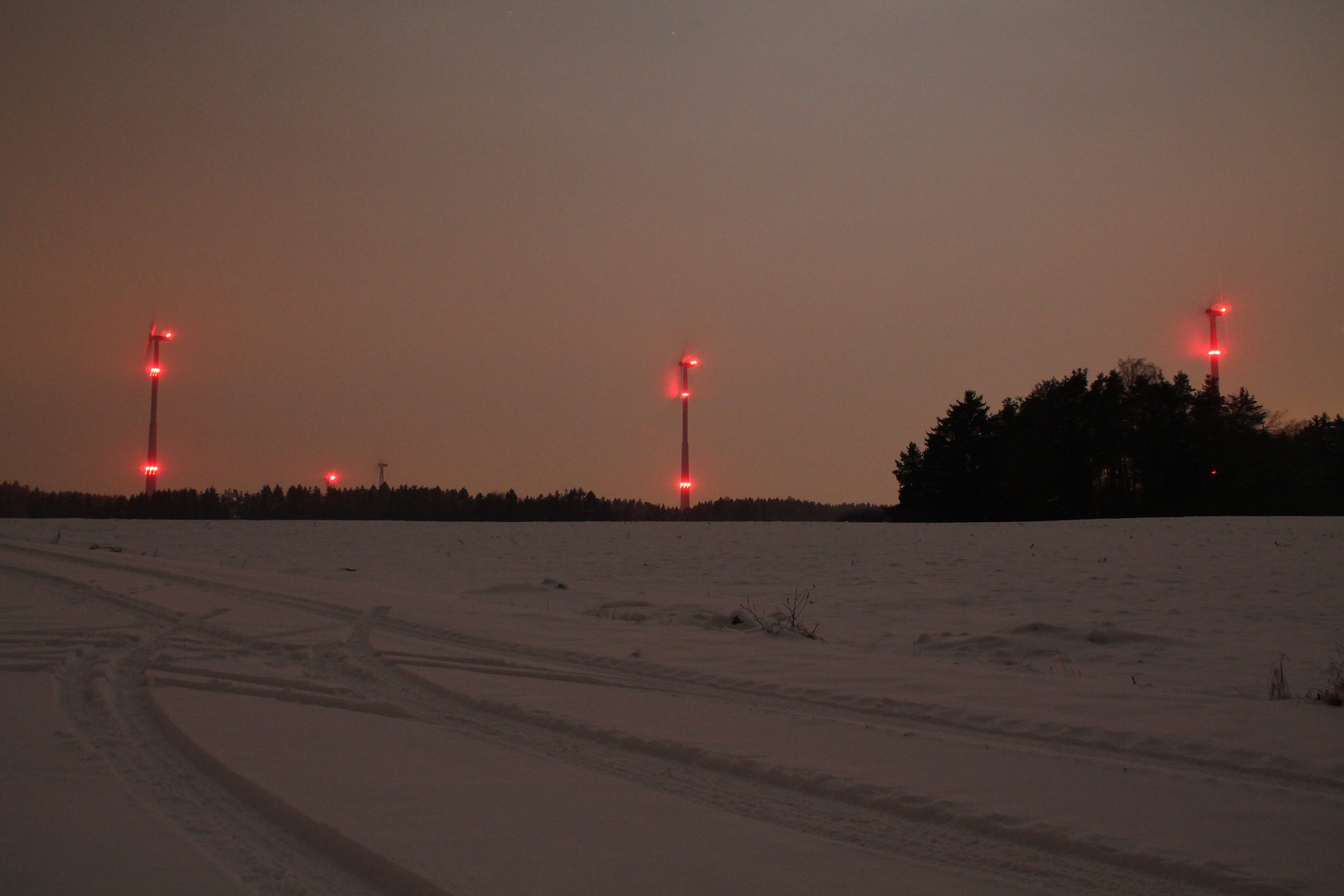 Windpark Neudorf. Nachtaufnahme.